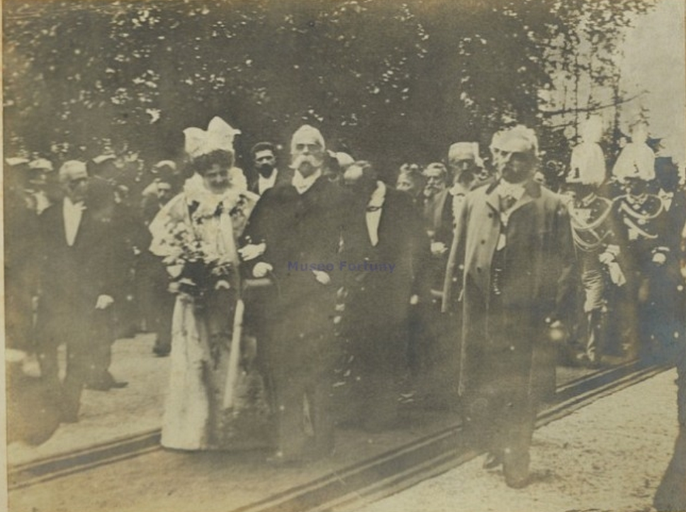 Umberto I e Margherita in visita all'Esposizione Internazionale d'Arte